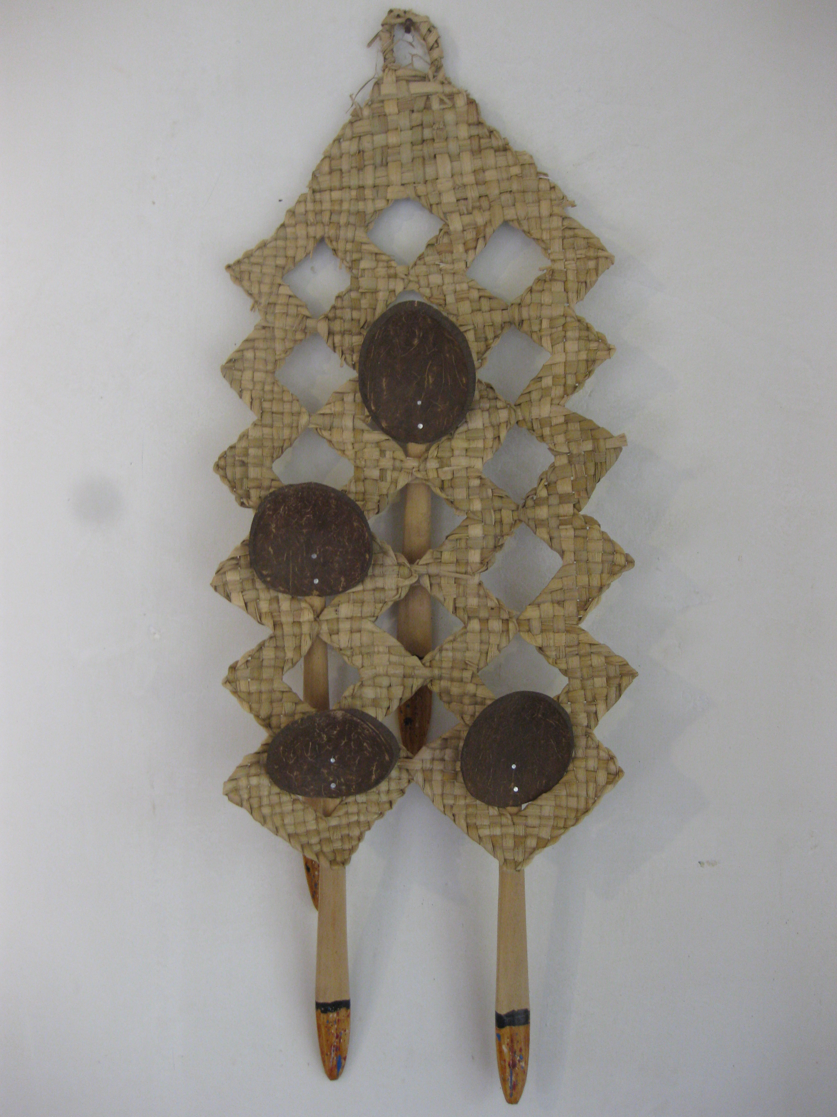 සිංහල: පන් වලින් වියන ලද හැඳි ආන.